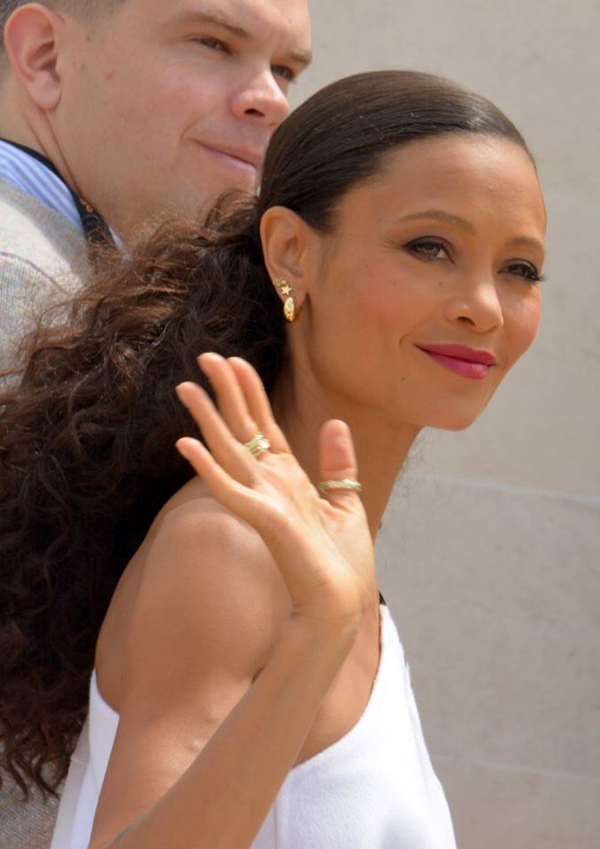 Thandie Newton au festival de Cannes.